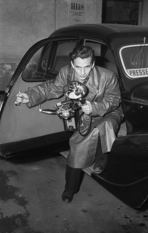 Illus/Schack- 11.10.1951 Verdienter Bildreporter wird ausgezeichnet. Horst Sturm, 28 Jahre, Bildberichterstatter des Illus-Bilderdienstes, erhält am Tag der Aktivisten das Ehrenzeichen "Für ausgezeichnete Leistungen" . Horst Sturm, der aus einer Arbeiterfamilie stammt und sich von Repro-Fotografen zum qualifizierten Bildberichterstatter entwickelte, hat durch sein gutes gesellschaftlichen Bewusstsein Aufnahmen gemacht, die der Popularisierung unseres neuen Lebens von grossem Nutzen sind. Das gilt insbesondere für seine Bildberichte von der Weltfriedesratstagung, der Europäischen Arbeiterkonferenz und anderen Ereignissen, wo Horst Sturm stets den arbeitenden Menschen und den Kampf um den Frieden in den Mittelpunkt seines Schaffens zu stellen weiss.